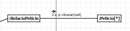 Comunicació en UML